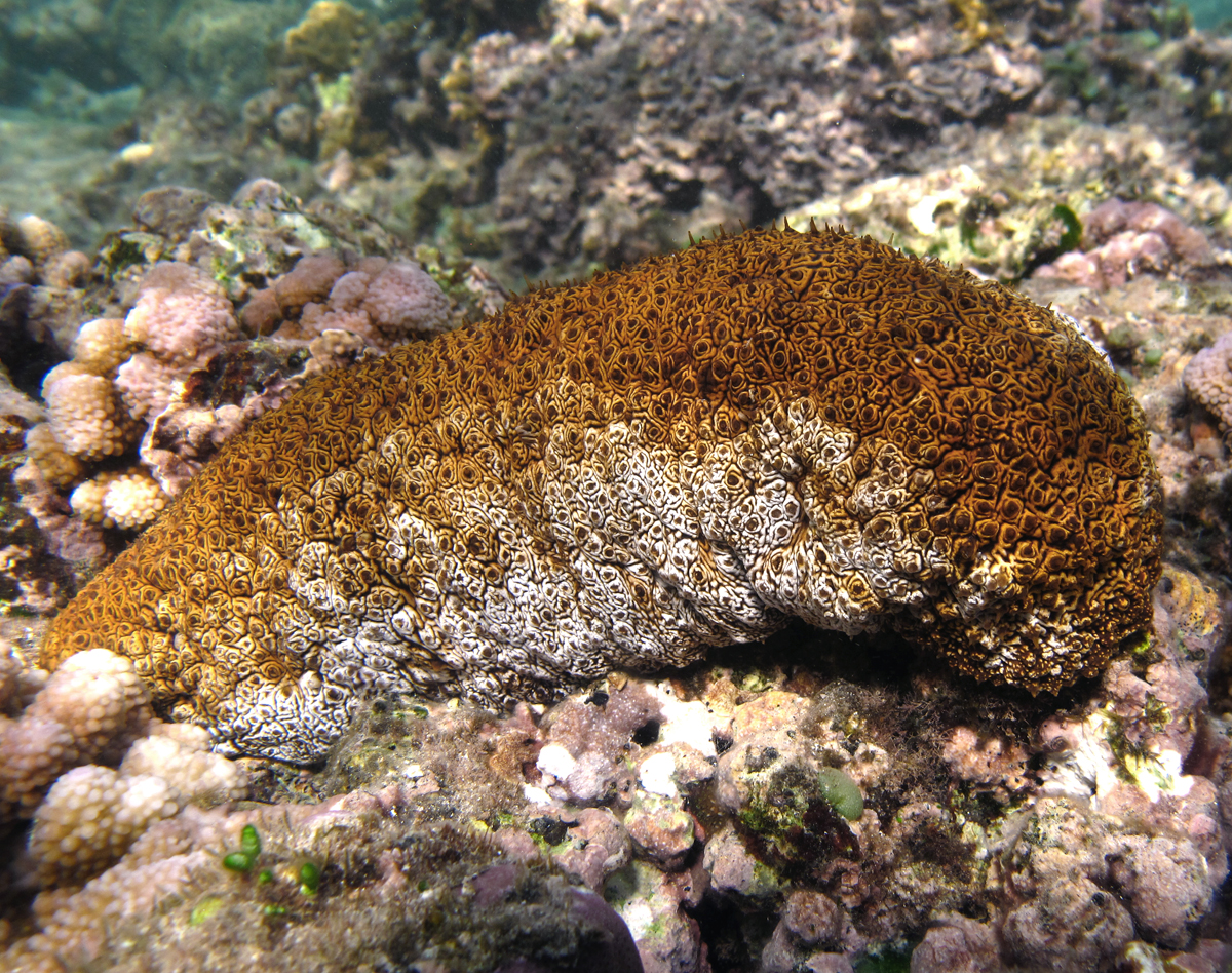 Holothurie Actinopyga mauritiana à la Réunion.